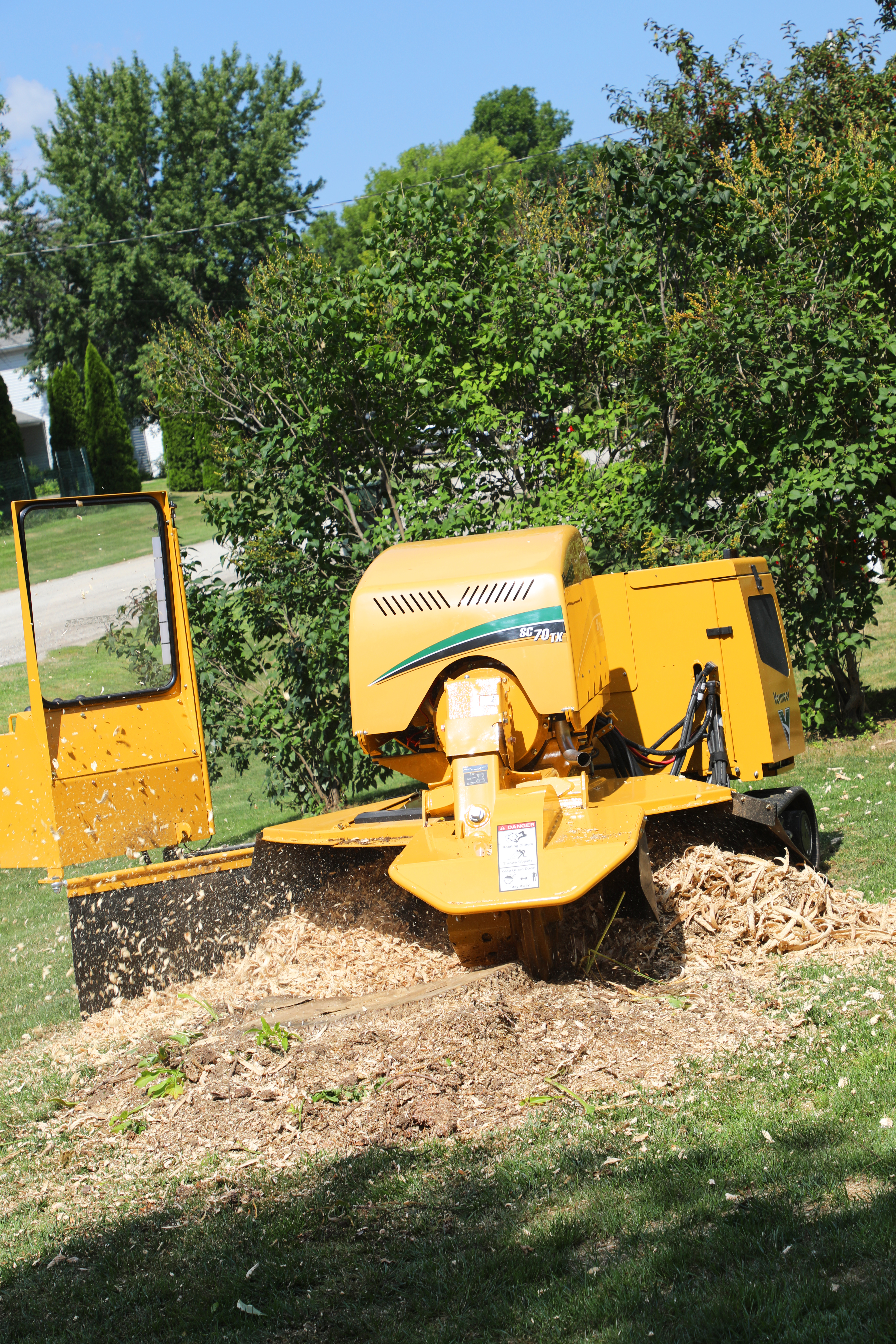 Vermeer stubbfräs SC70TX fräser stubbe. Stubbfräsning